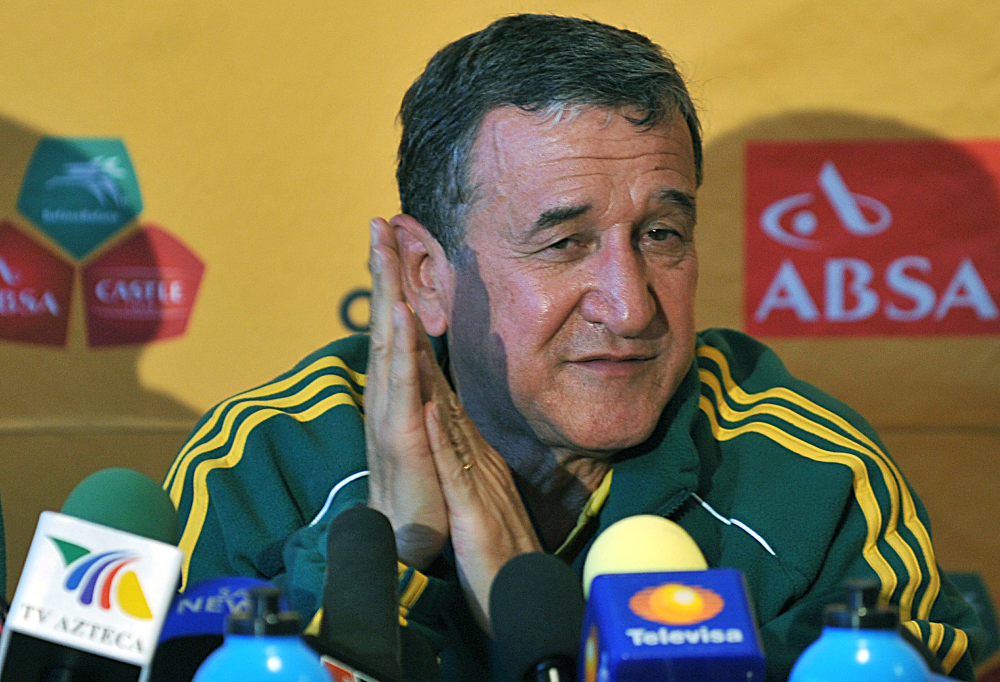 Johannesburgo (África do Sul) - O treinador da África do Sul (Bafana Bafana), o brasileiro Carlos Alberto Parreira, concede entrevista à imprensa, após treino da seleção na Universidade de Witwatersand.